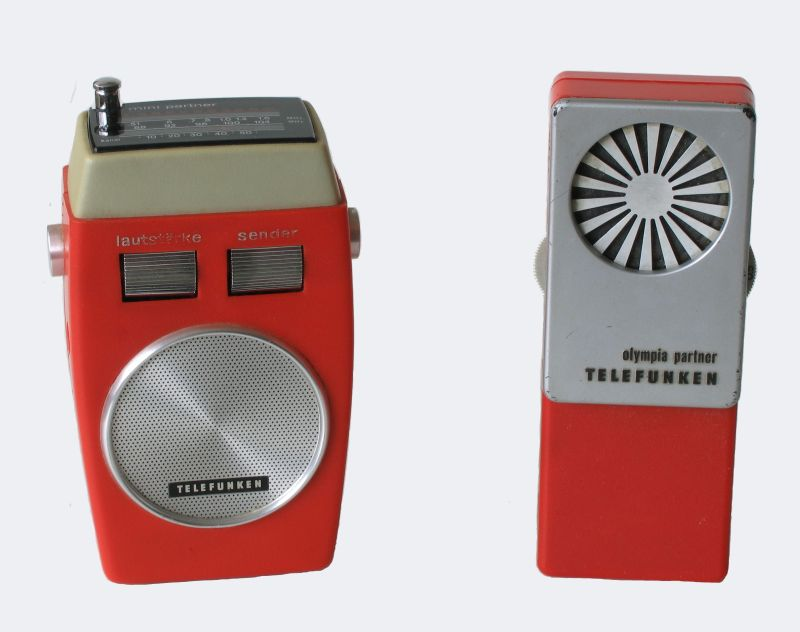 Transistorradios Telefunken "mini partner" (UKW/MW) und "olympia partner" (MW) aus dem Jahre 1972